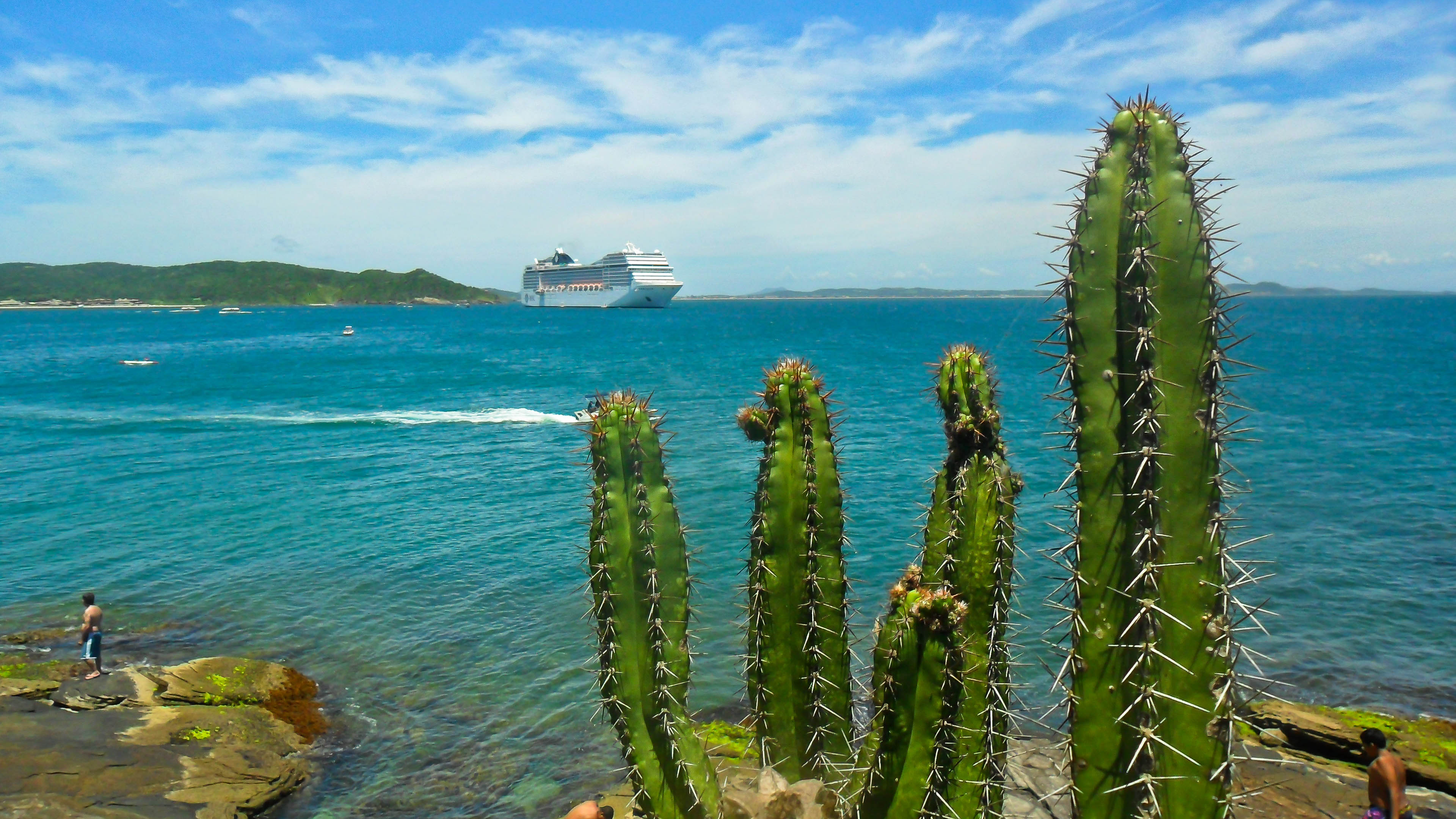 Descrição_para_sua_foto